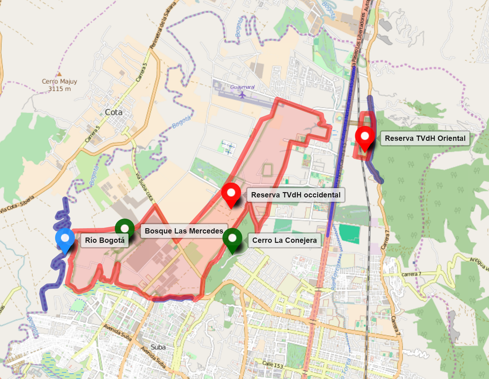 Mapa delineando la Reserva van der Hammen en el norte de Bogotá, donde se ven los bosques importantes, así como las áreas ya urbanizadas a Febrero de 2016. This map may be incomplete, and may contain errors. Don't rely solely on it for navigation.